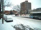 (C) Copyright 2004 Yanik Crépeau - Montréal sous la neige en avril. Photo prise par Yanik Crépeau le 5 avril 2004 près de la station de métro Papineau à Montréal au Québec. Yanik Crépeau 6 avr 2004 à 19:51 (CEST)